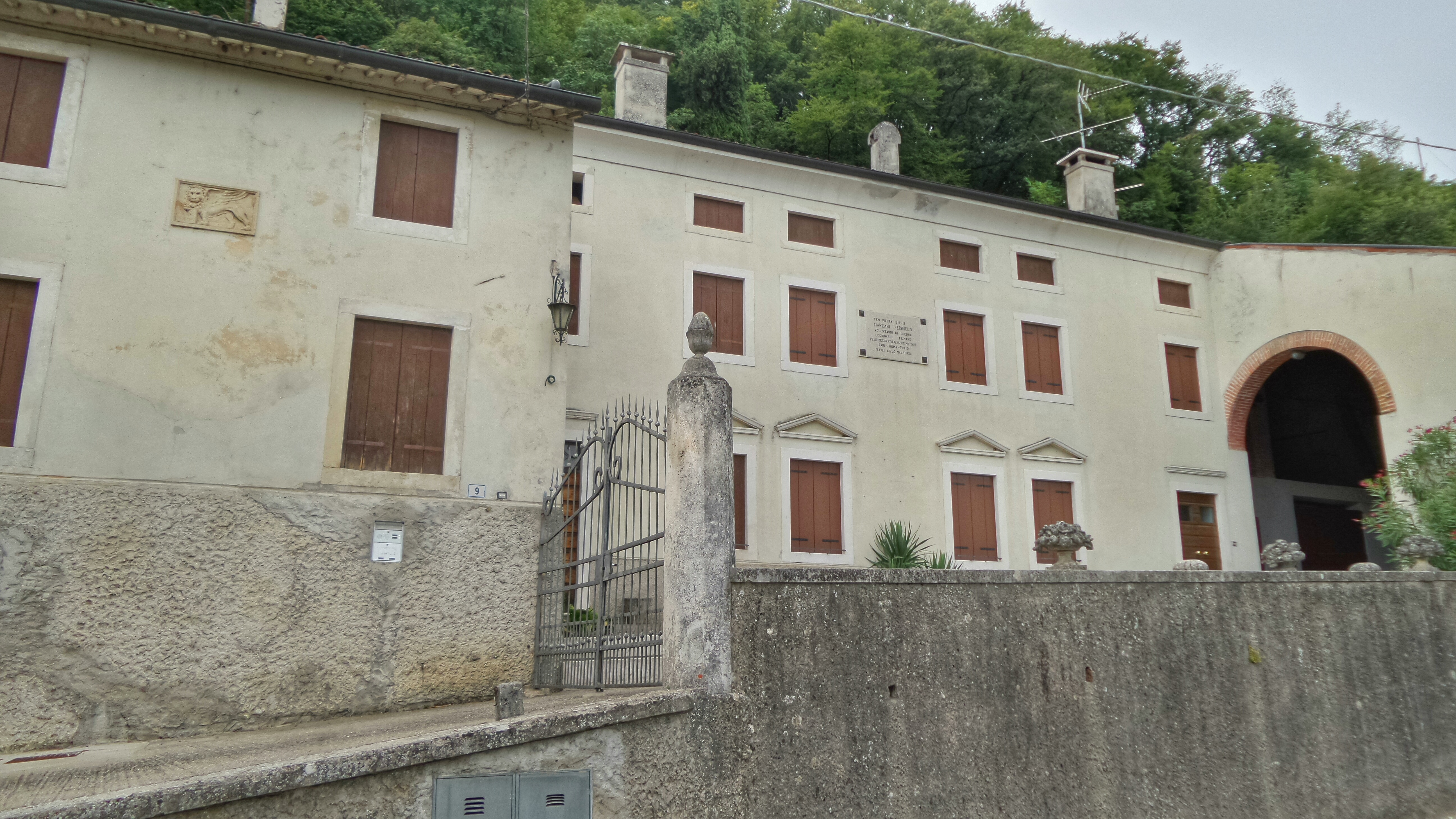 Residenza giovanile dell'aviatore Ferruccio Marzari